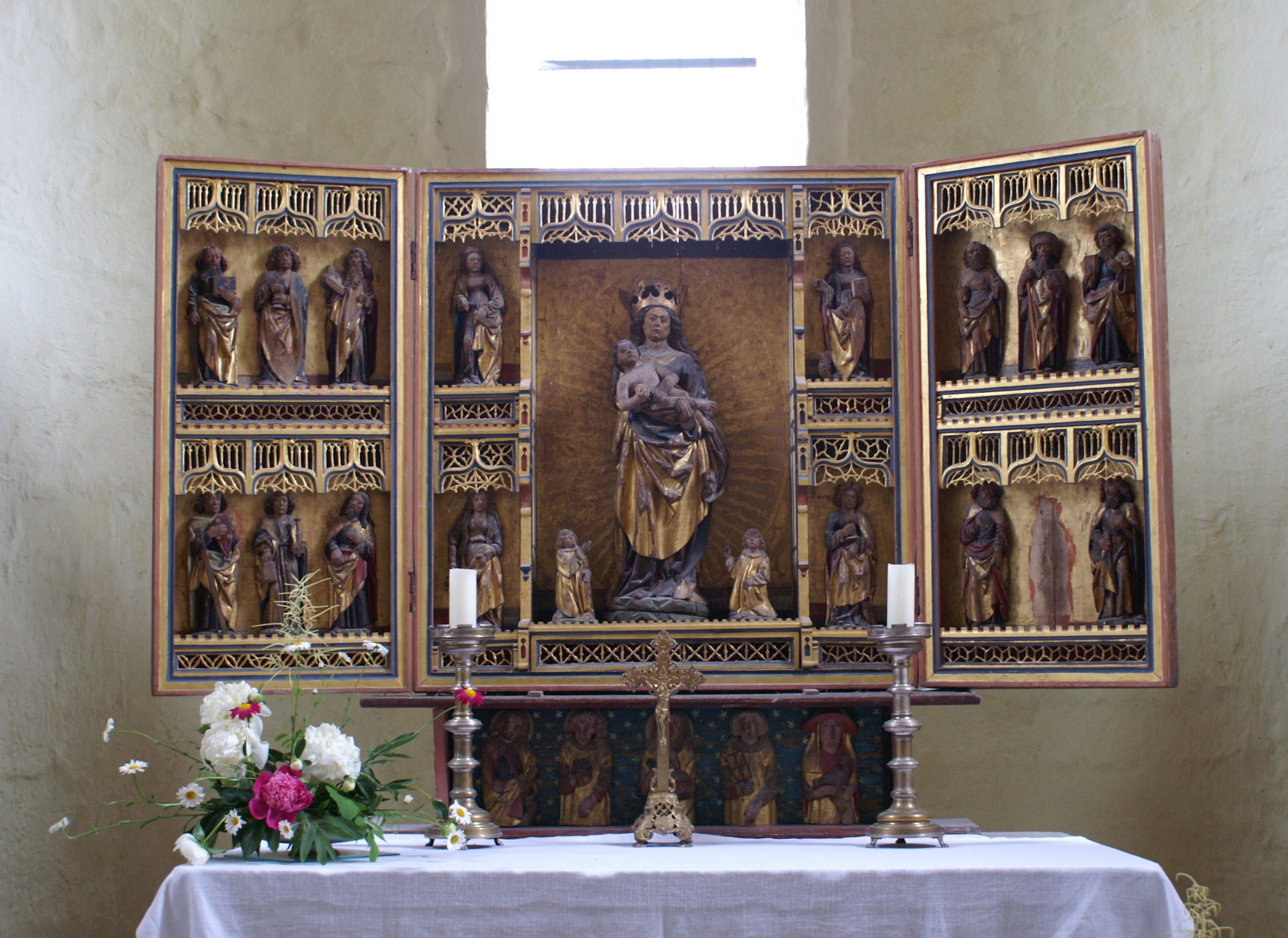 Marienaltar St. Gangolf Kirche in Münchenlohra